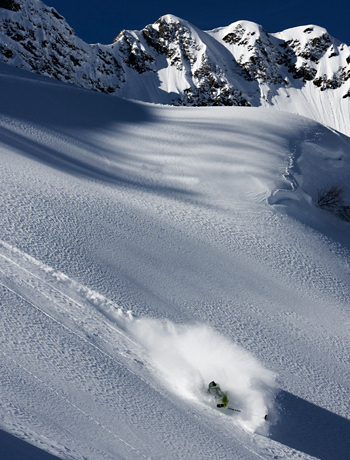 Wille tar en stor stor sväng i ryssland.(Foto Nicklas Blom)